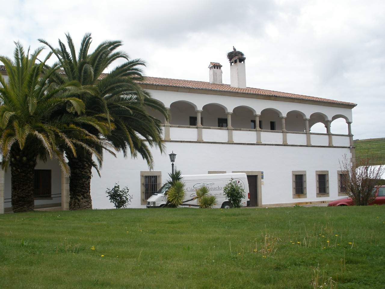 Cáceres - Monasterio de San Francisco el Real